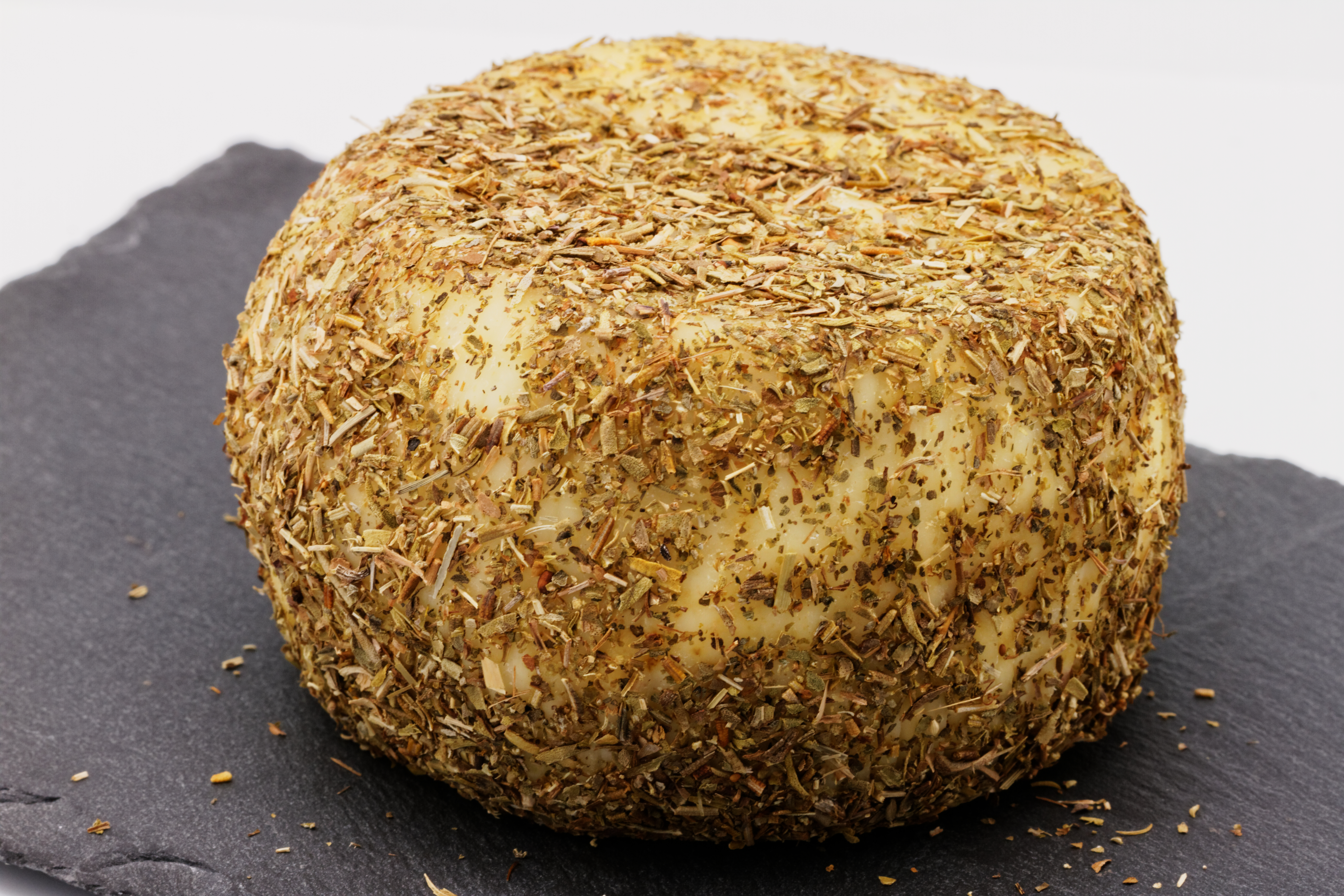 Un Fleur du Maquis, fromage de Corse.